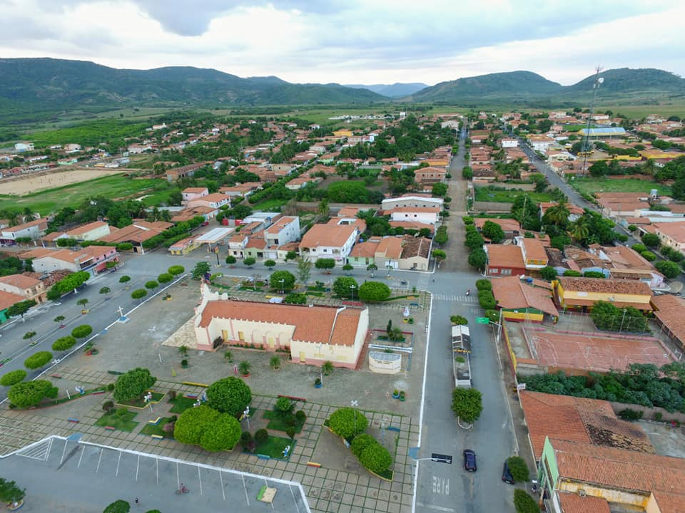 Vista Aérea do Município de Ararendá Ceará